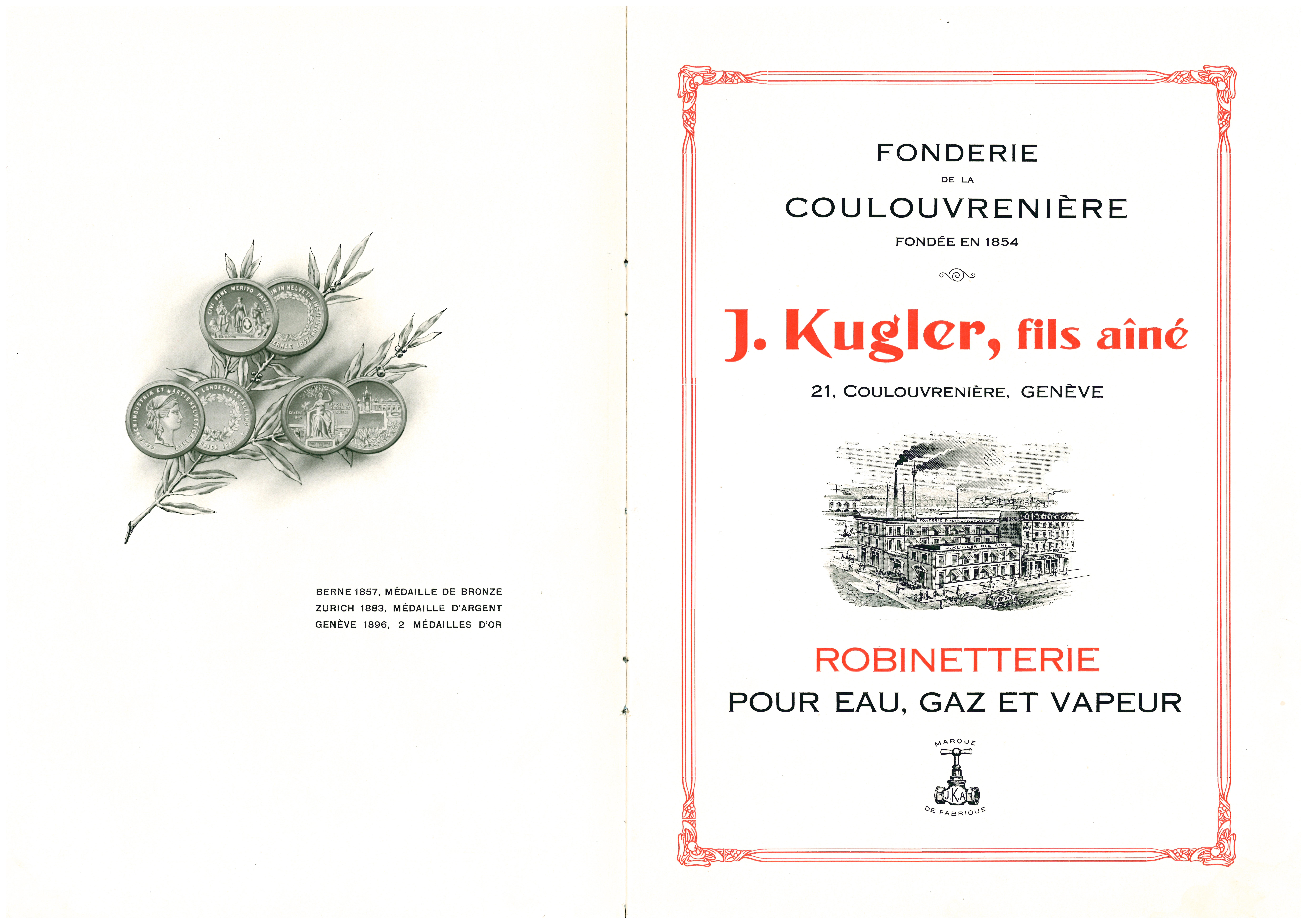 Zeichnung von den Medaillen der Landesausstellungen 1856, 1883 und 1896; Plakat von J. Kugler